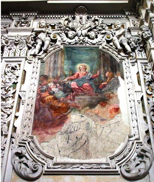 Church Messina Chiesa di Sant'Elia